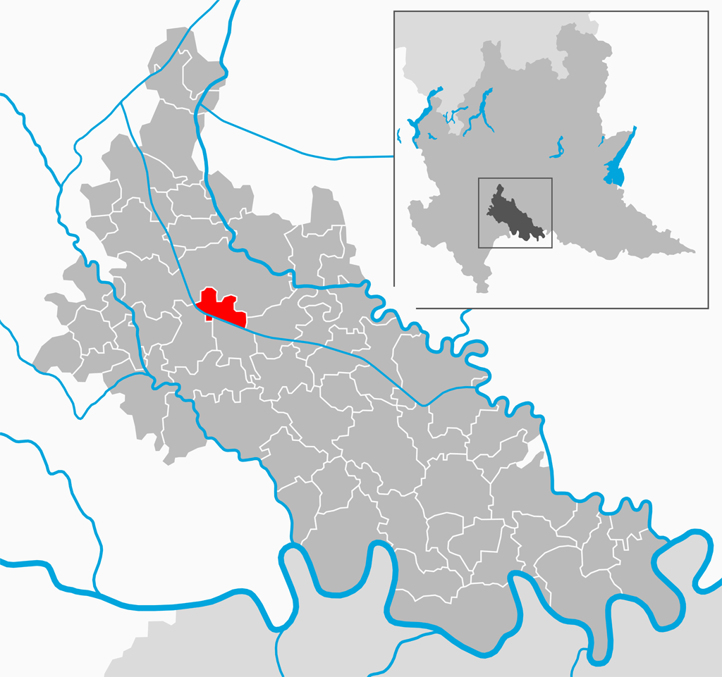 Il comune di Cornegliano Laudense nella provincia di Lodi